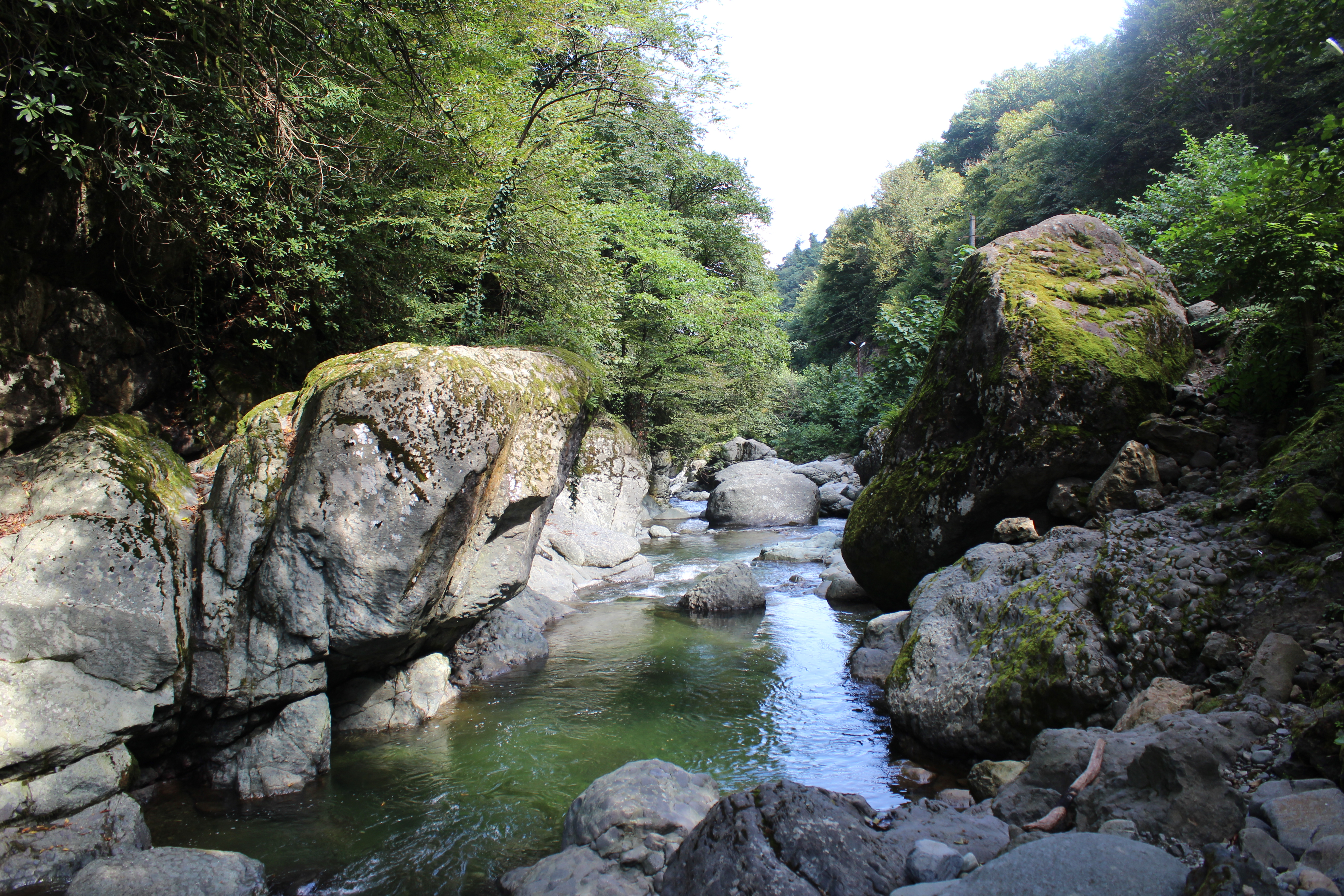 დევის ქვა